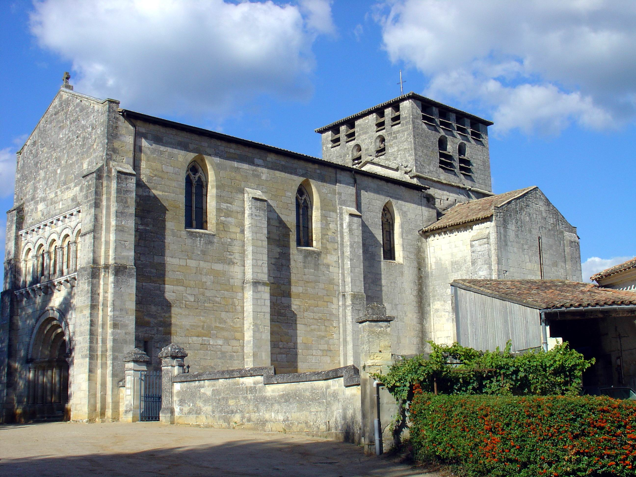 Eglise de Saint-Denis-de-Pile, Gironde, France (près de Libourne) Septembre 2006 Michel Buze